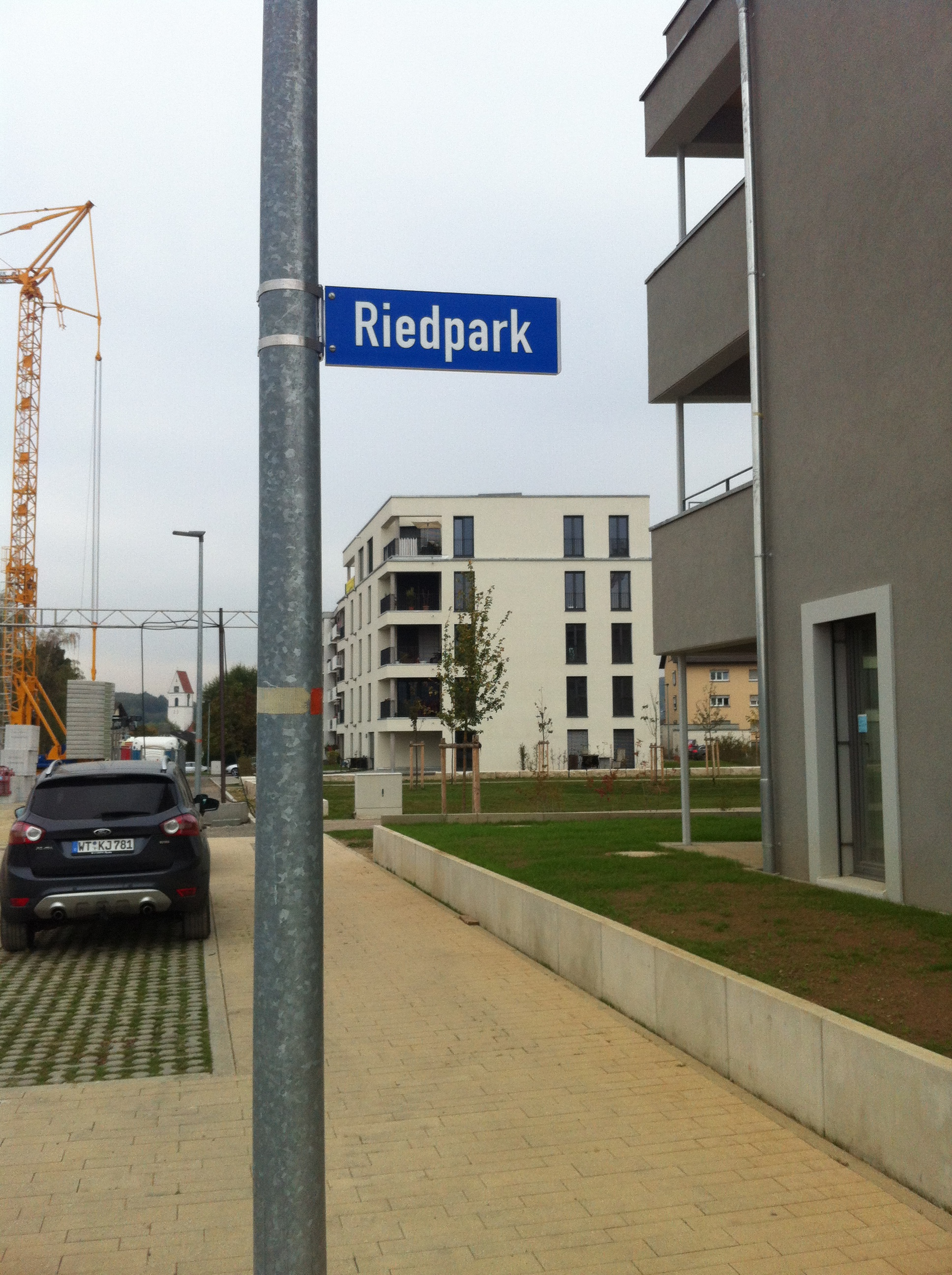 Lauchringen, Gemeinde im Landkreis Waldshut in Baden Württemberg. Wohnbaugebiet Riedpark mit Mehrgenerationenhaus und Wohnanlage für eine ambulant betreute Wohngemeinschaft.